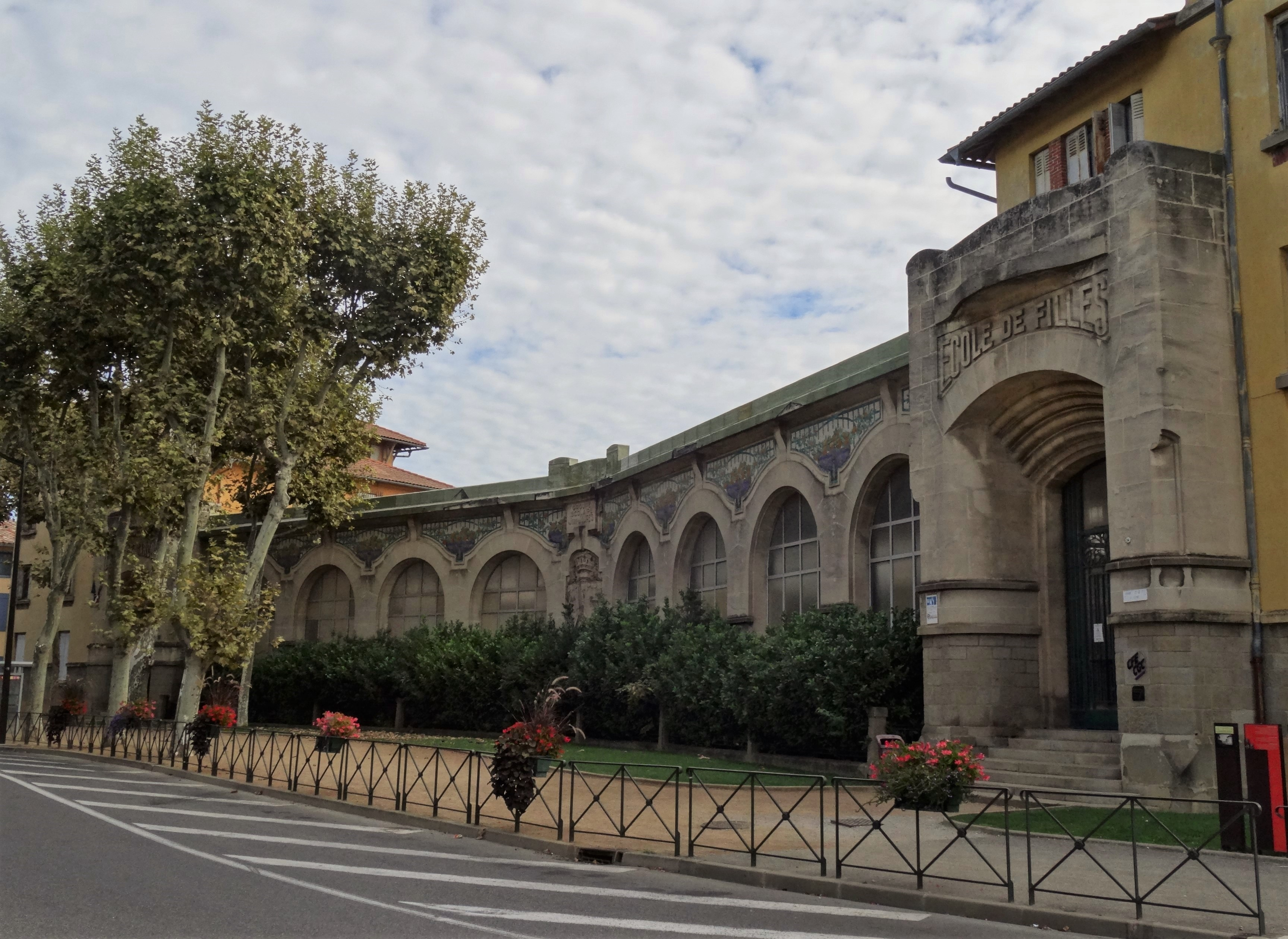 Groupe scolaire Jean-Jaurès de Carcassonne, Inscrit aux Monuments Historiques